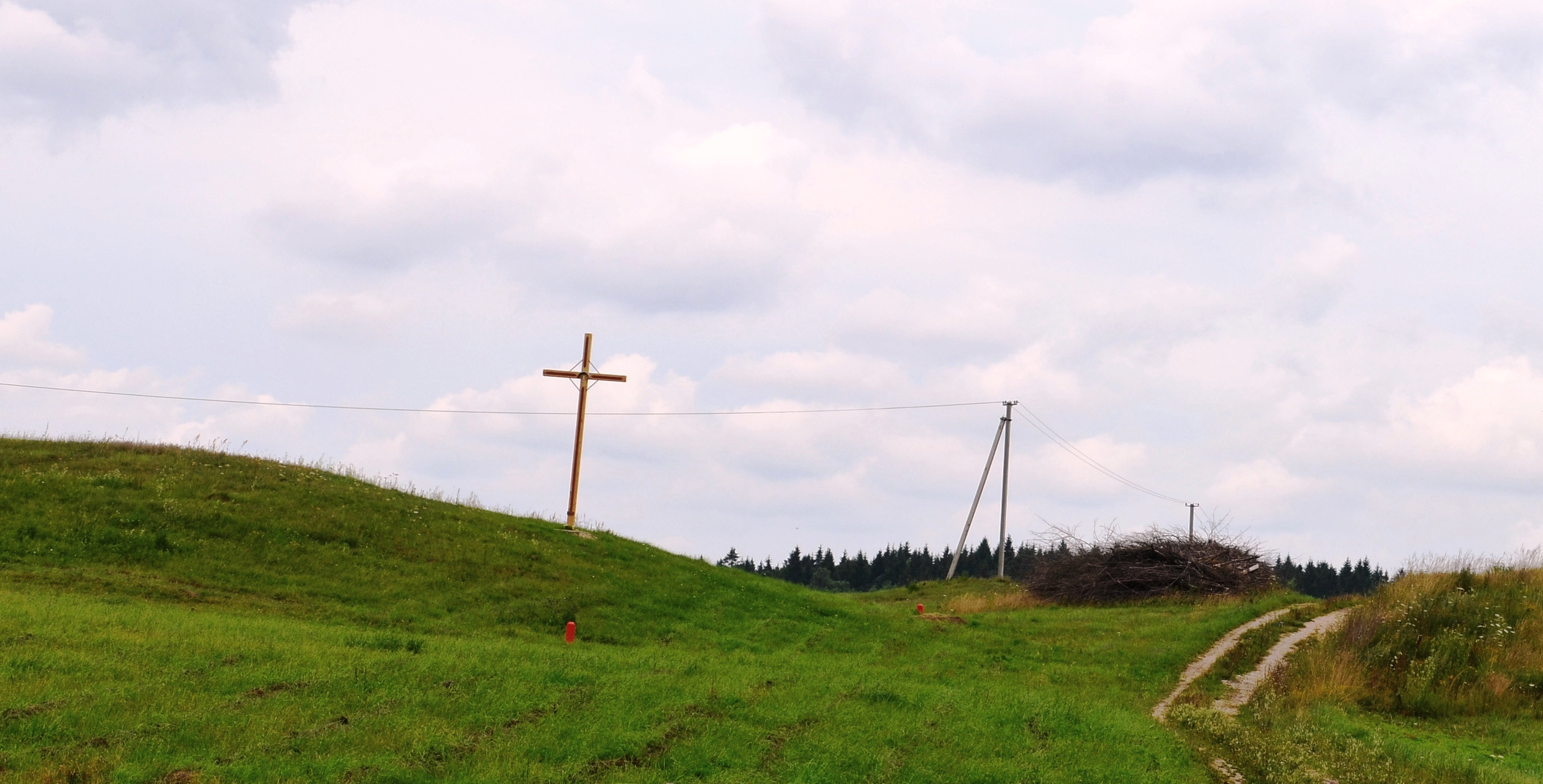 Kryžius, Zanėnai, Molėtų r.